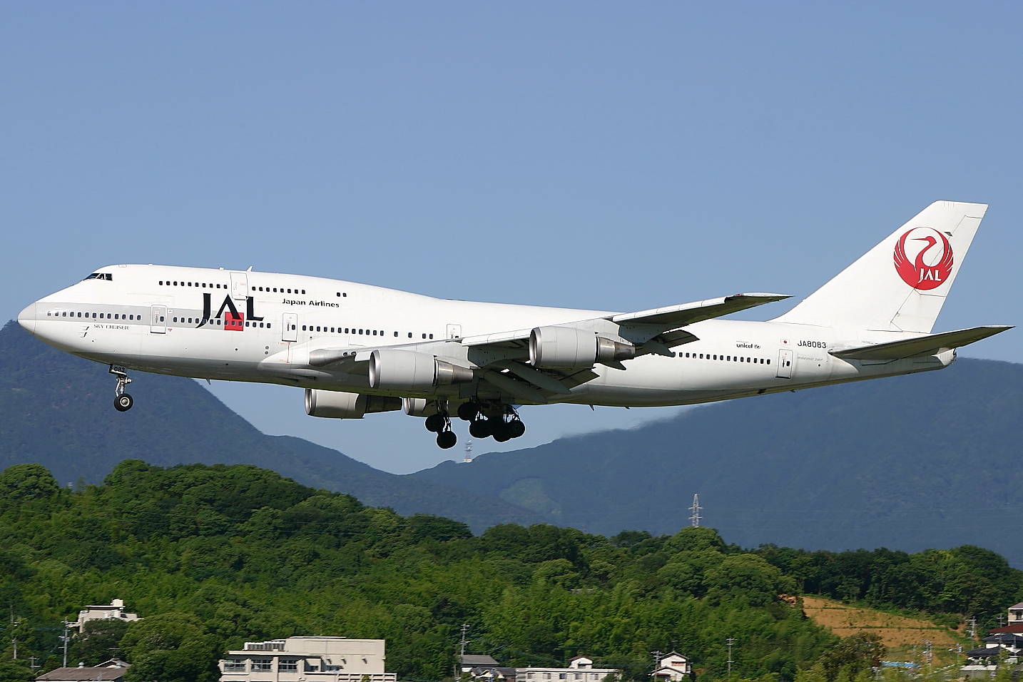 日本航空 ボーイング 747-400 福岡空港